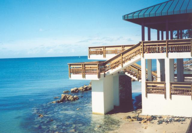 Uno de los edificios recreativos en Isla de Cabras, Puerto Rico